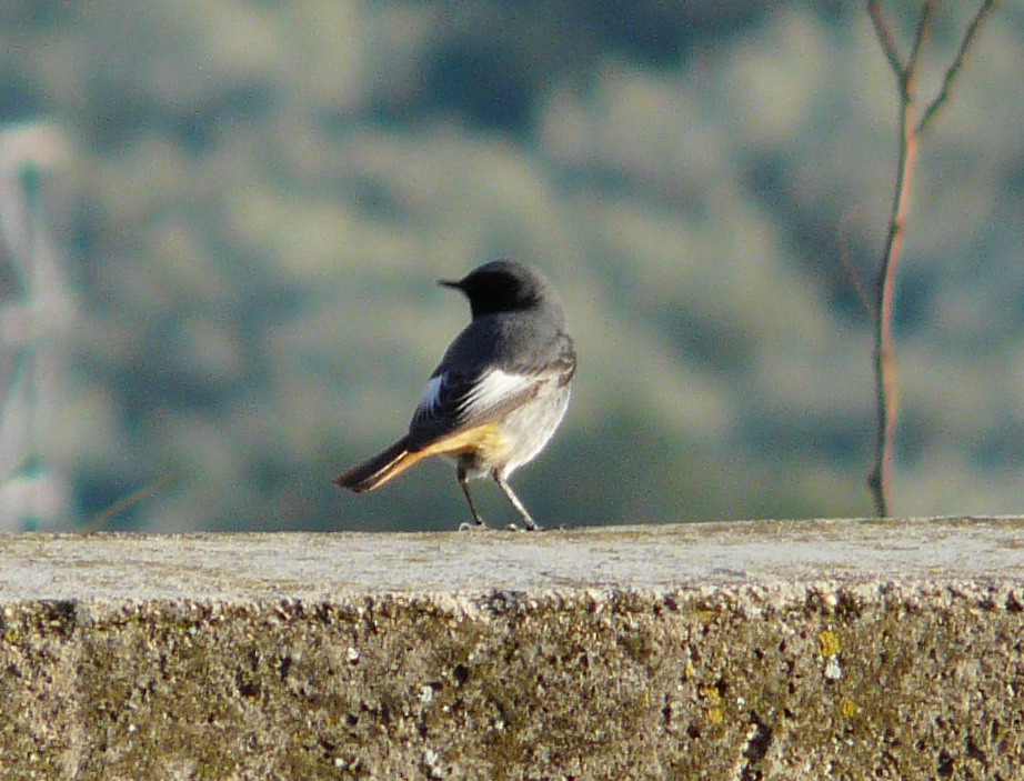 Cotxa fumada (Phoenicurus ochruros gibraltarensis) a Mas de Barberans.